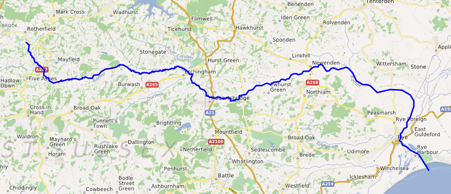 Carte réalisée sur umap This map may be incomplete, and may contain errors. Don't rely solely on it for navigation.